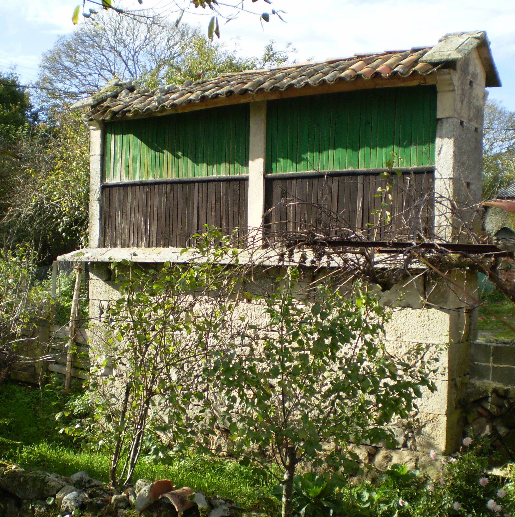 Hórreo de dous claros, sobre soleira construída ad hoc. Cuberta de tella do país, non presenta adornos. Ubicado na Chapeleira-Dorra (Antas de Ulla)